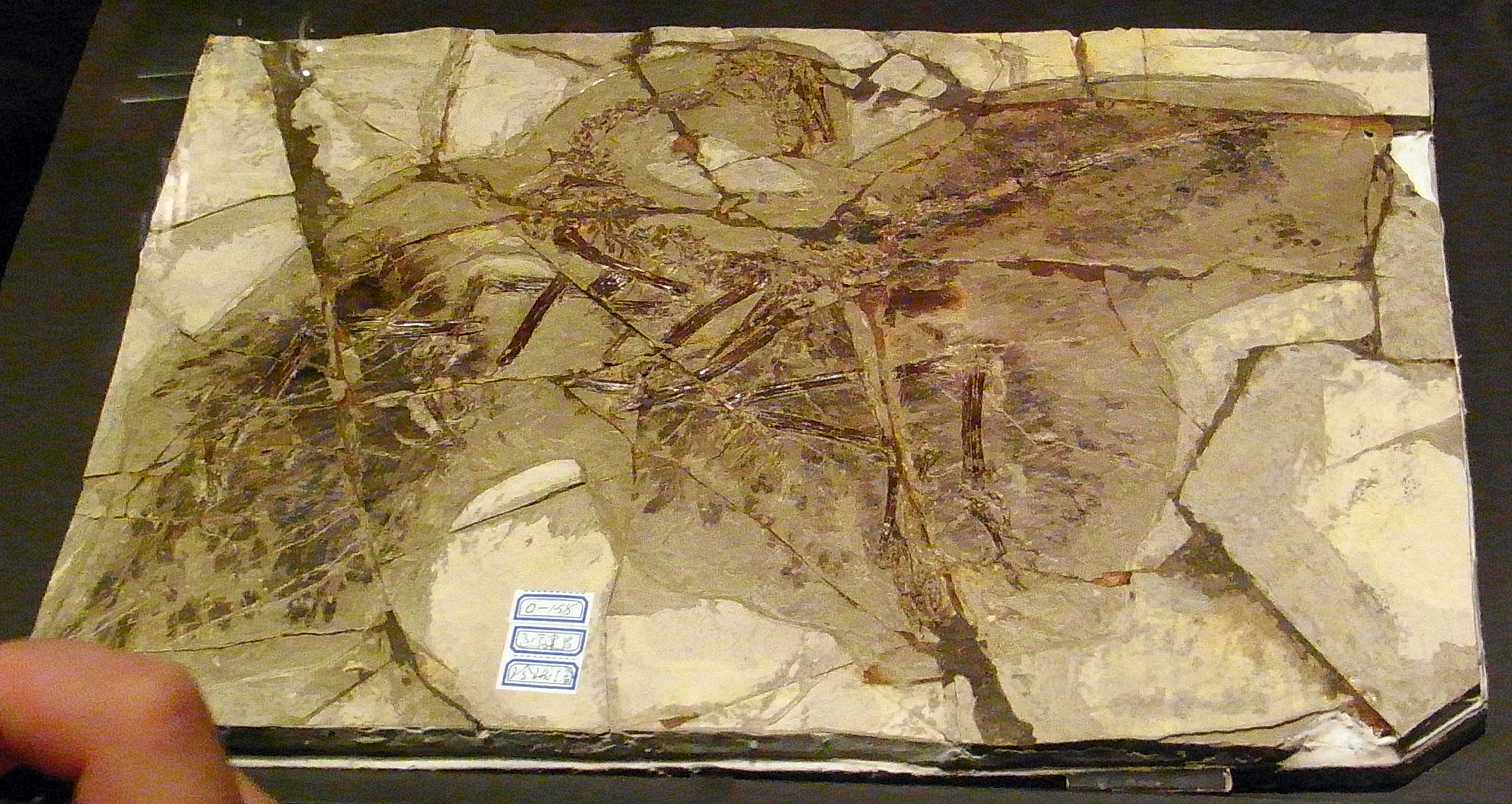 アンキオルニスの羽毛のメラニン色素から当時の羽の色を解明したという。